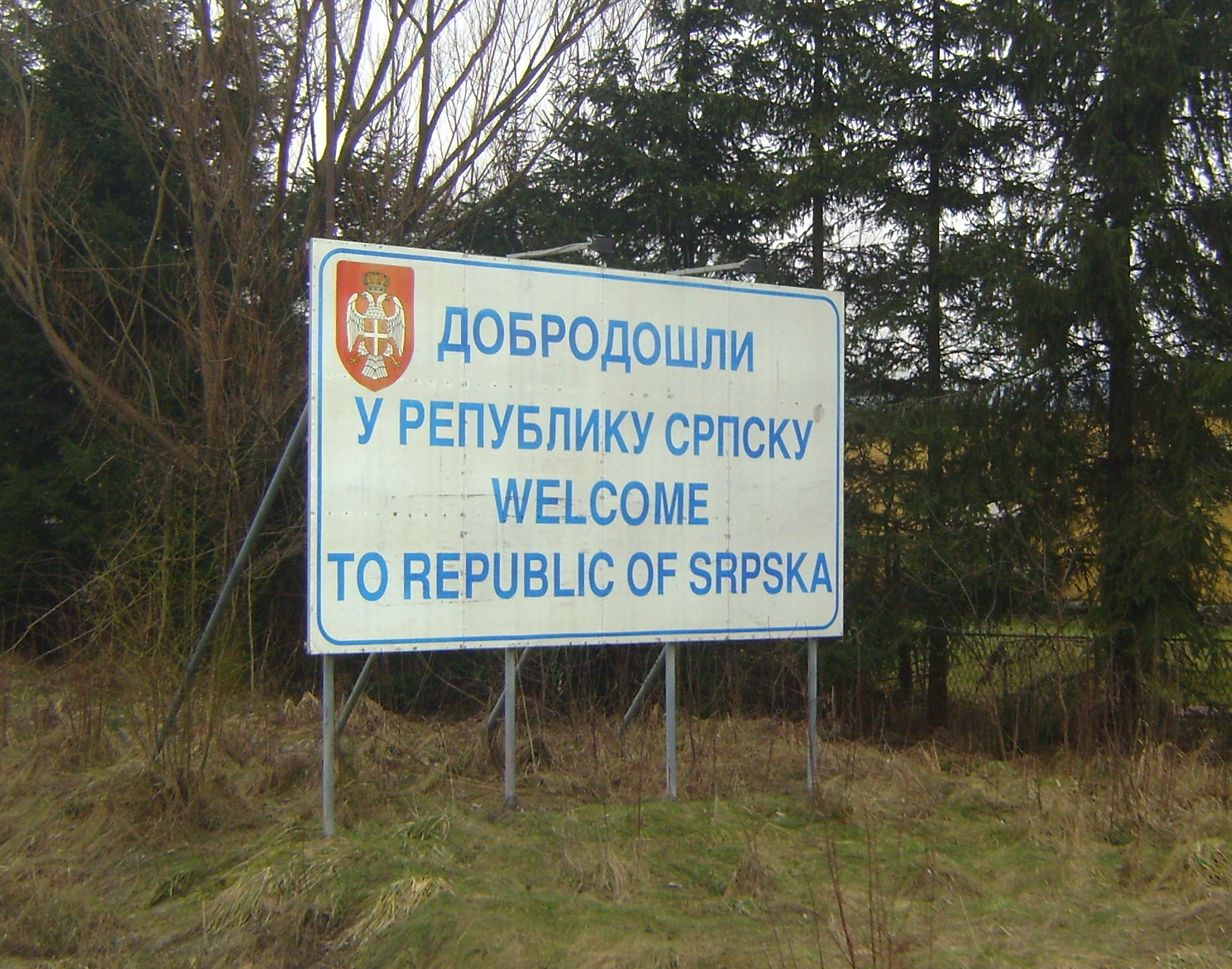 Hinweistafel der Republika Srpska in Sarajevo